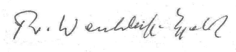 Friedrich-Wilhelm Wentzlaff-Eggebert. Signatur eines mir am 19.12.1965 handgeschriebenen Briefes